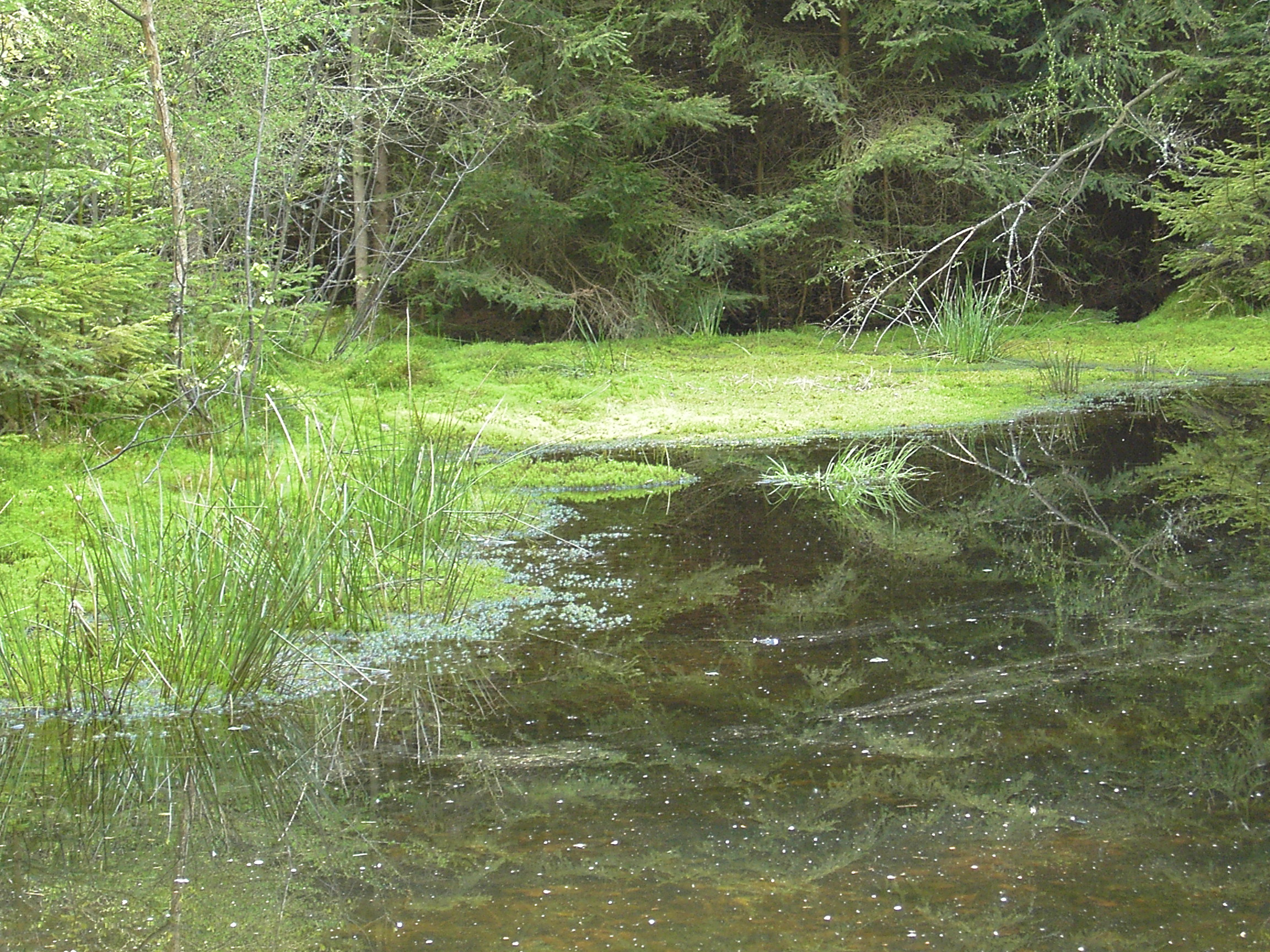 Přírodní památka Písník u Sokolovce